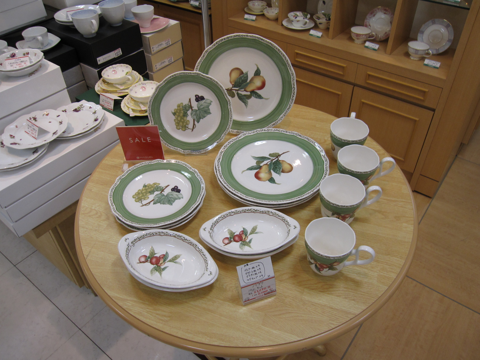 Noritake